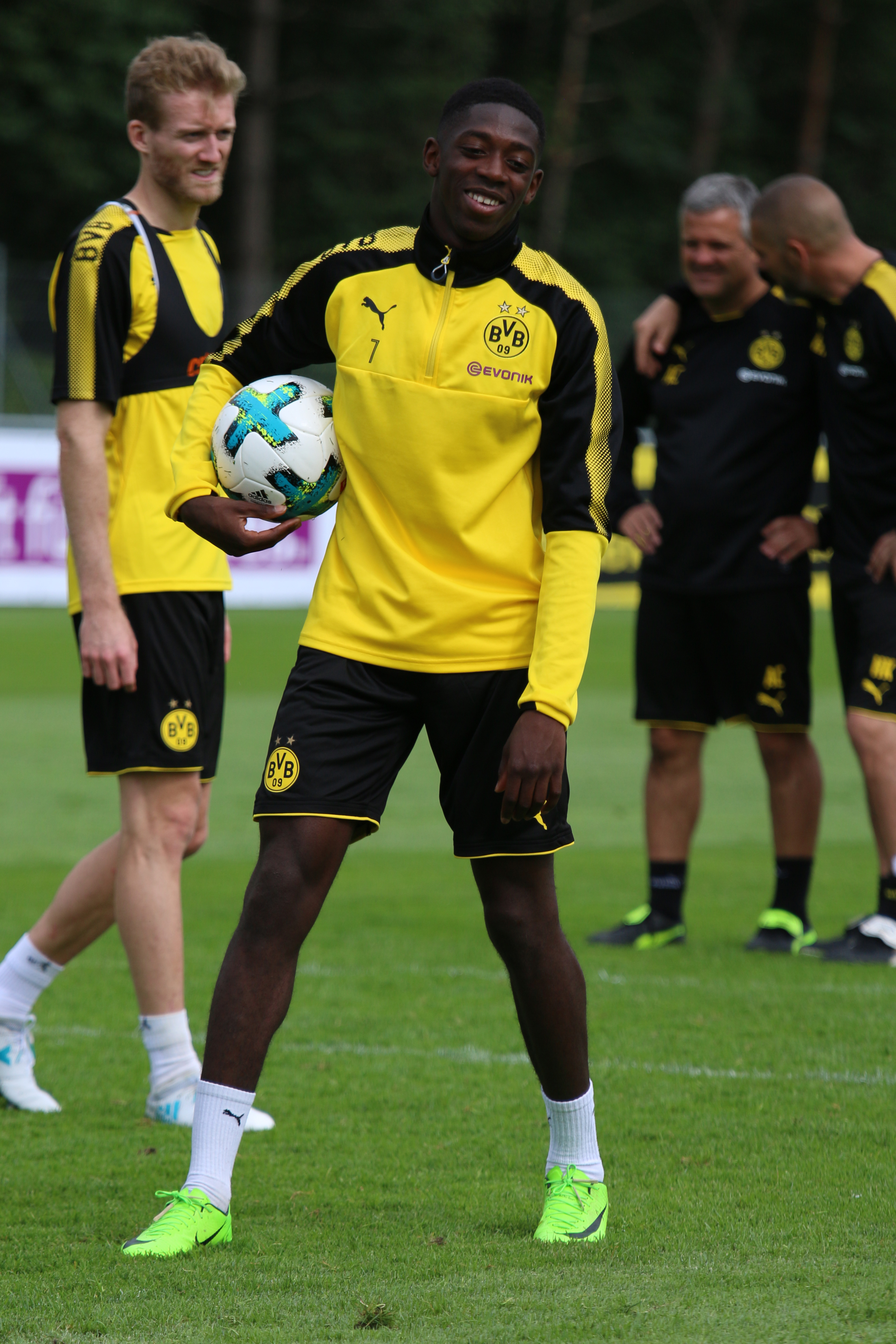 Ousmane Dembélé im BVB Trainingslager in Bad Ragaz 2017